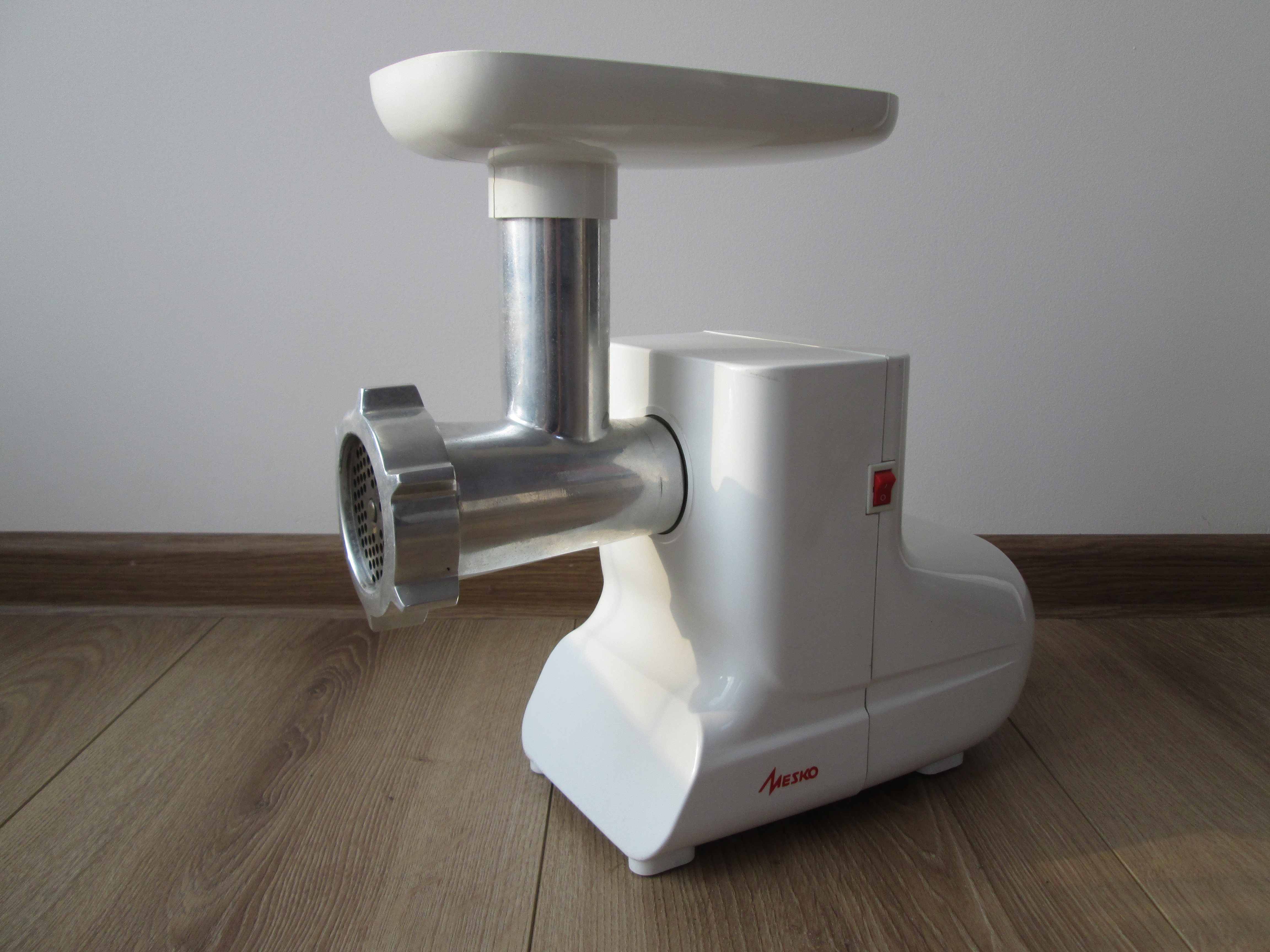 elektrischer Haushaltswolf ZM Mesko EM-2